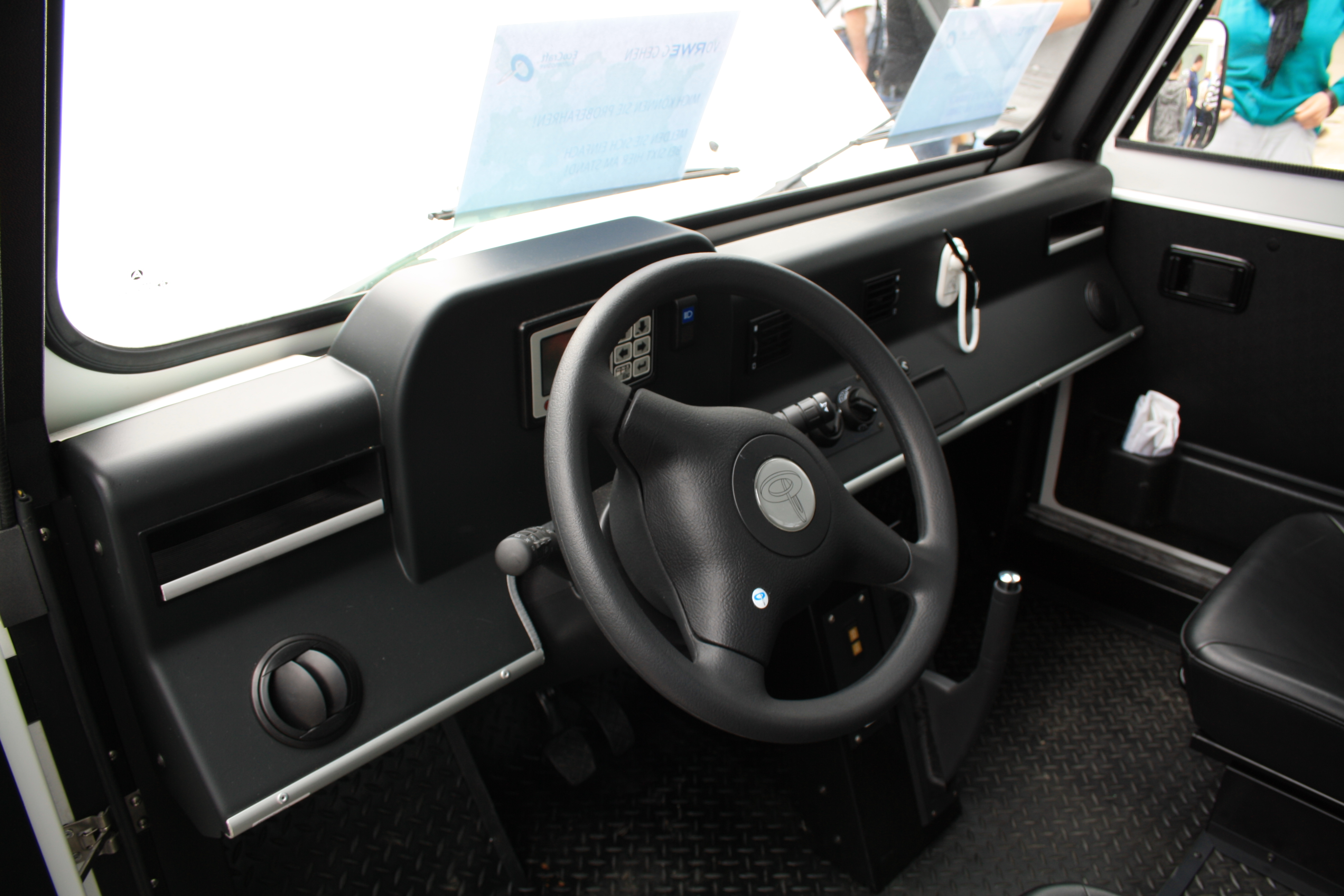 Innenraum des Eco Carrier EL von Ecocraft, ein deutsches Elektroauto mit einer Ladekapazität von vier Europaletten auf der Pritsche. Die Aufnahme entstand am Stand Elektromobilität des Mannheimer Maimarkt 2010.